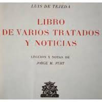 Libro de Varios Tratados y Noticias de Juan de Tejeda (edición de J. Furt)